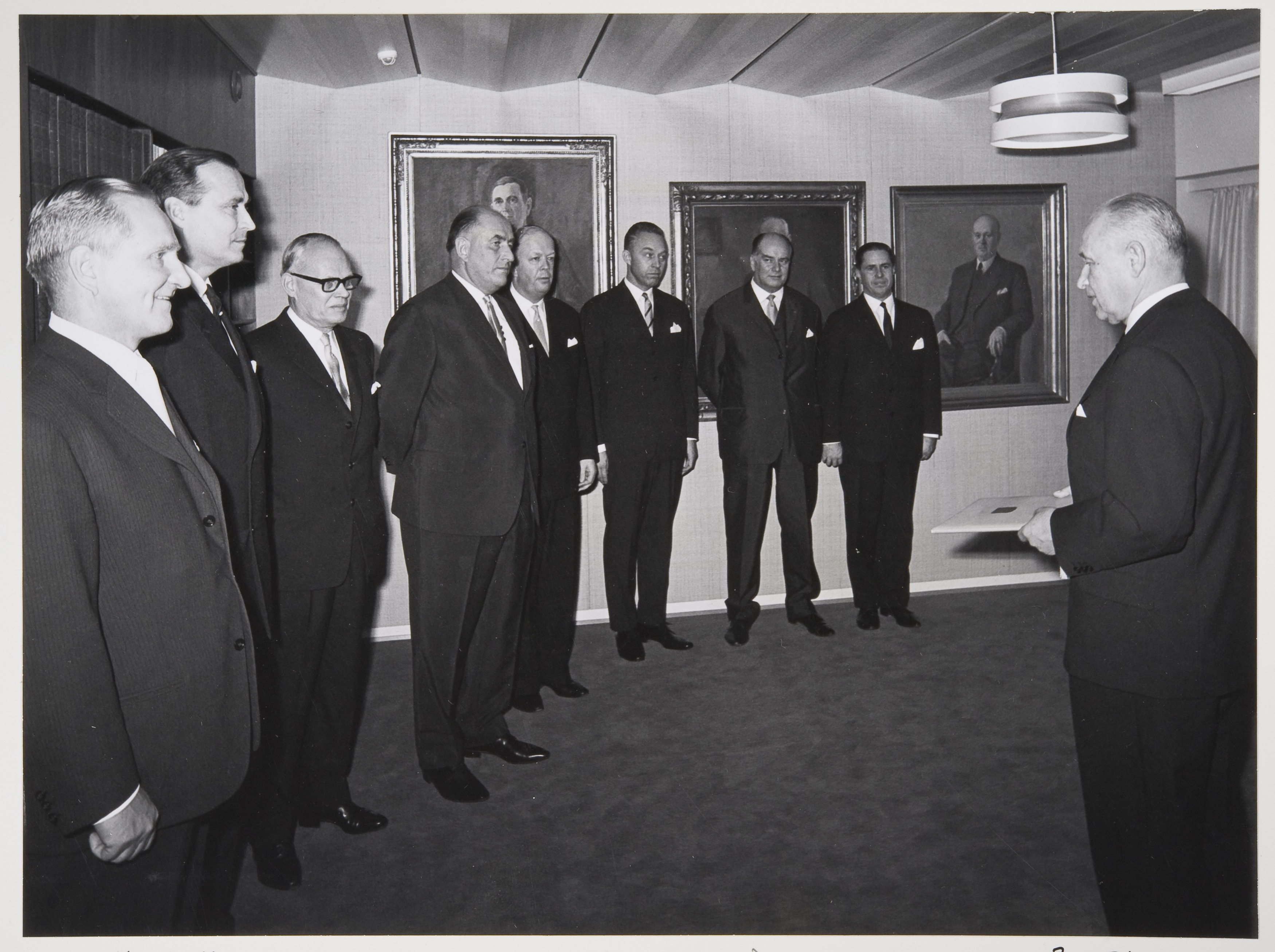 Hallitusneuvos Niilo Saarnio (oik.) onnittelemassa Helsingin kauppakamaria sen 50-vuotispäivänä.